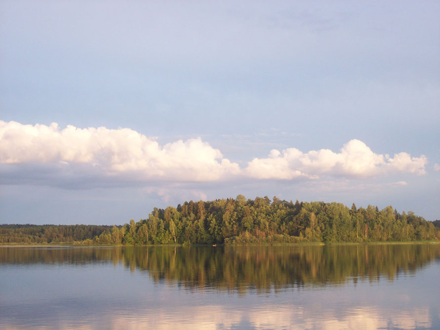 Распашной остров на озере Сапшо.